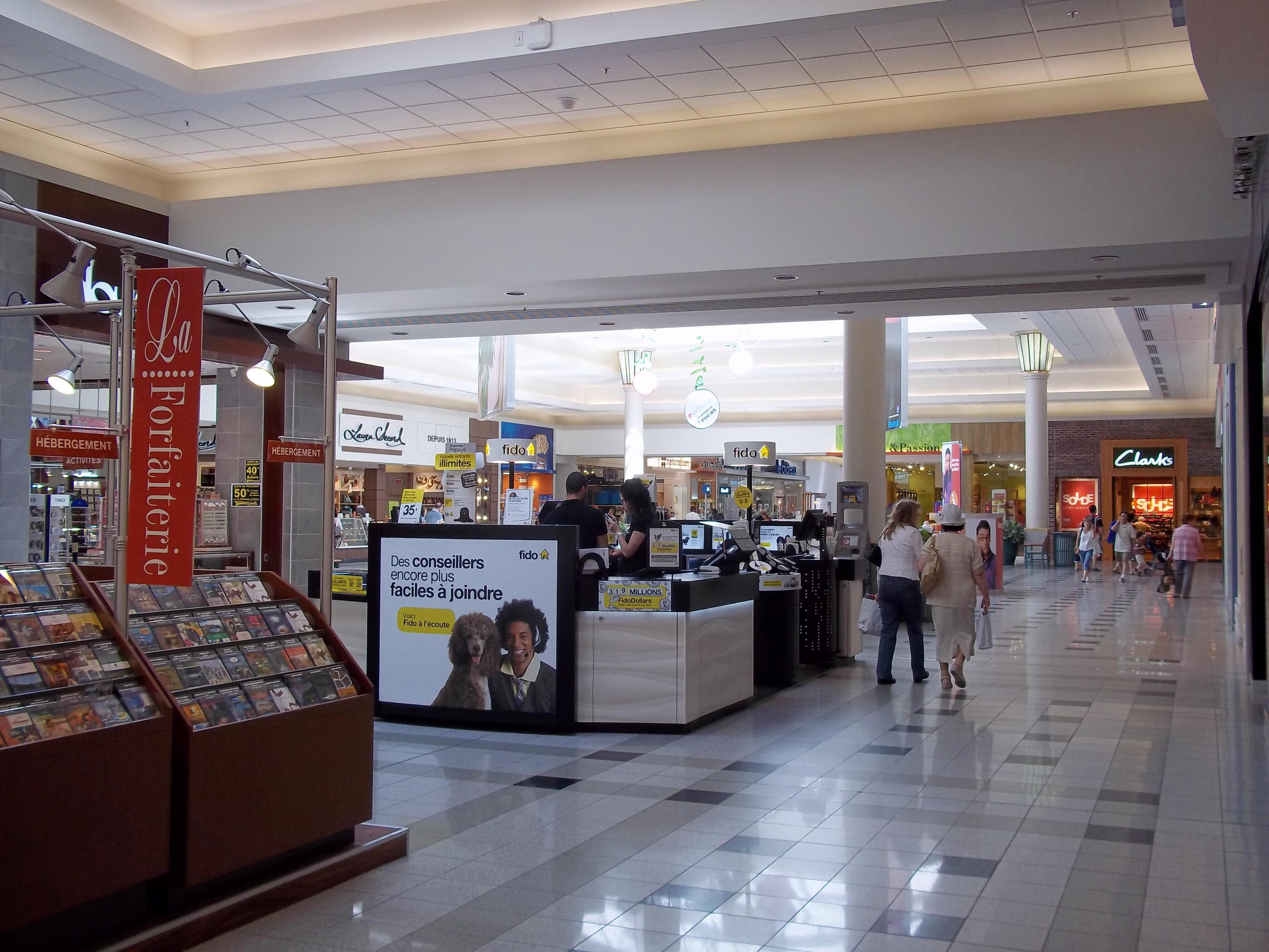 Les Galeries d'Anjou, Montréal